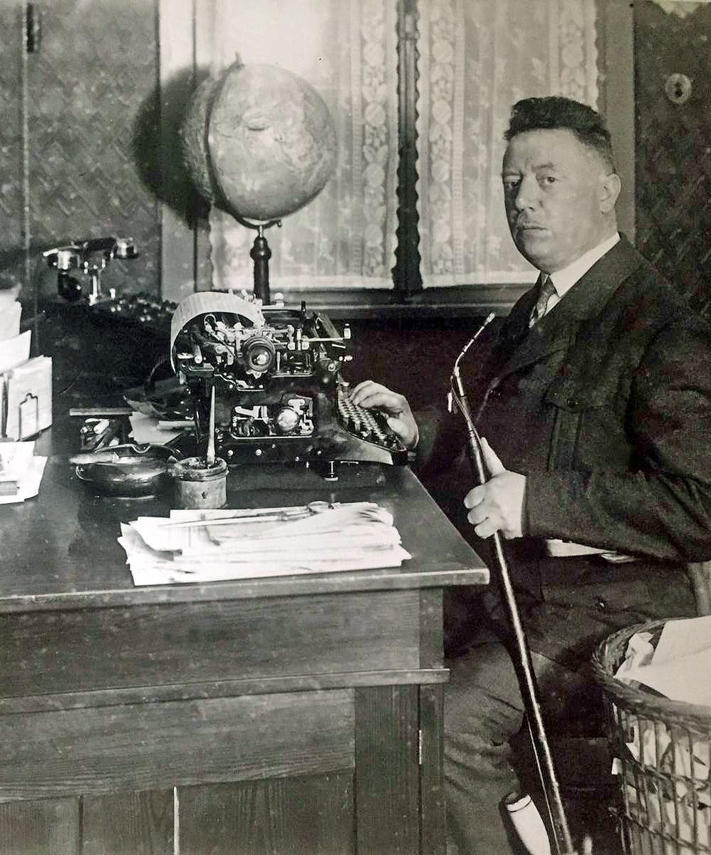 Nahaufnahme des Verlegers und Journalisten Edmund Schiefeling beim Layout in alter Art mittels Schere und Lineal, Pfeifenraucher